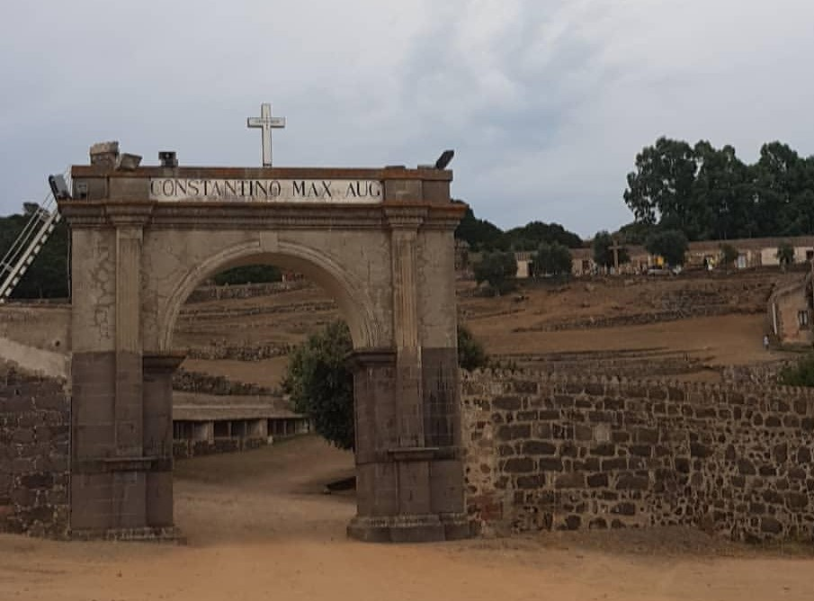 Arco Monumentale in onore di San Costantino, ingresso principale del Santuario di San Costantino a Sedilo